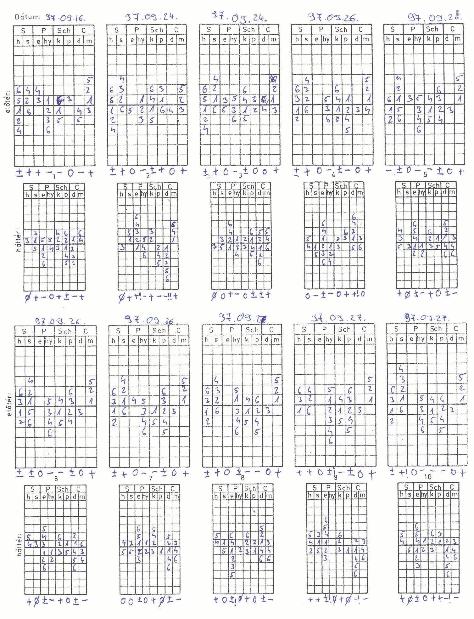 Szondi-teszt, saját tesztfelvétel, a vsz. engedélyével